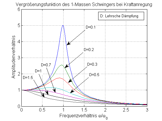 Vergrößerungsfunktion des linearen 1-Massen Schwingers bei Kraftkopplung. Parameter: Lehrsche Dämpfung.